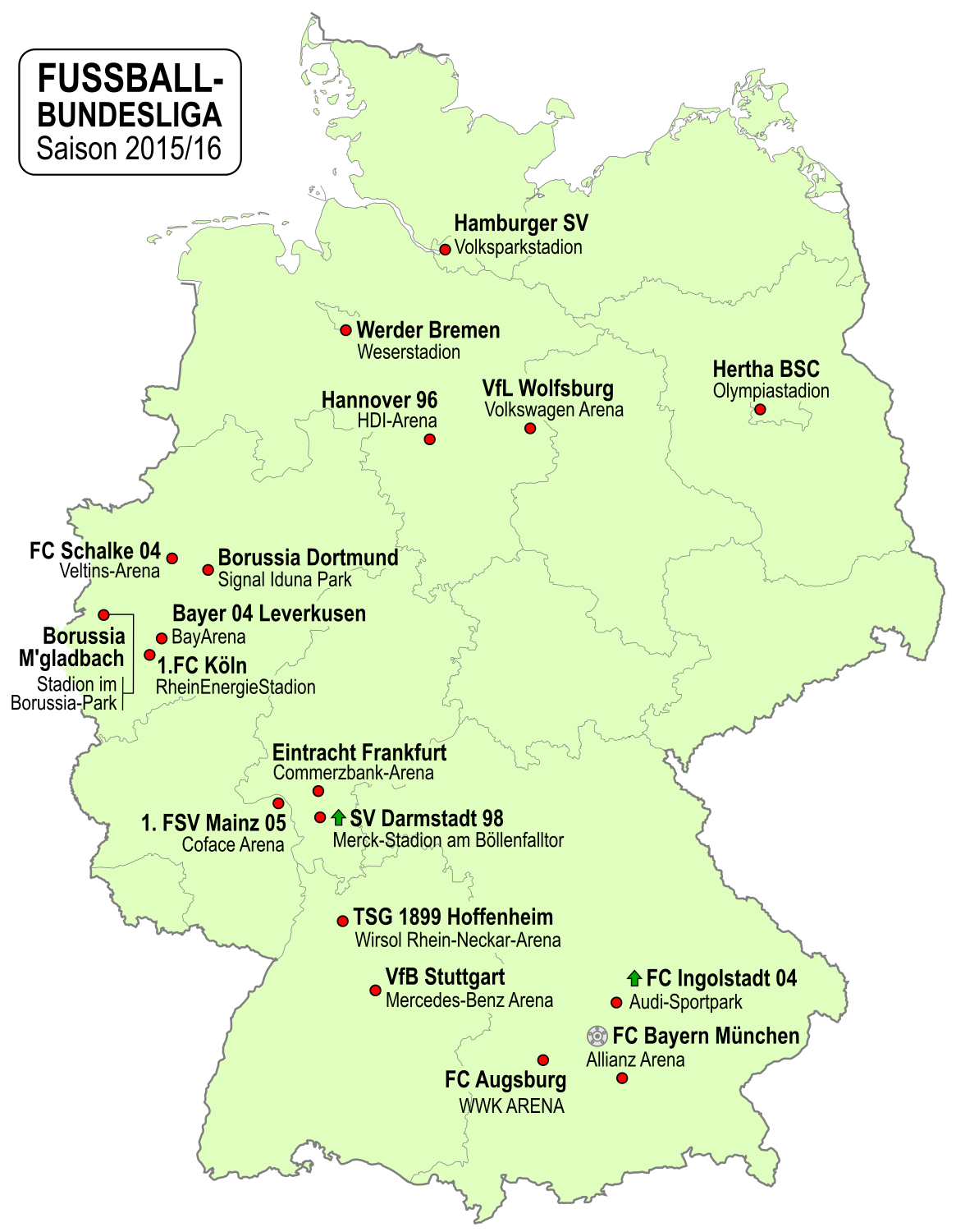 Karte der Vereine der Fußball-Bundesliga-Saison 2015/2016